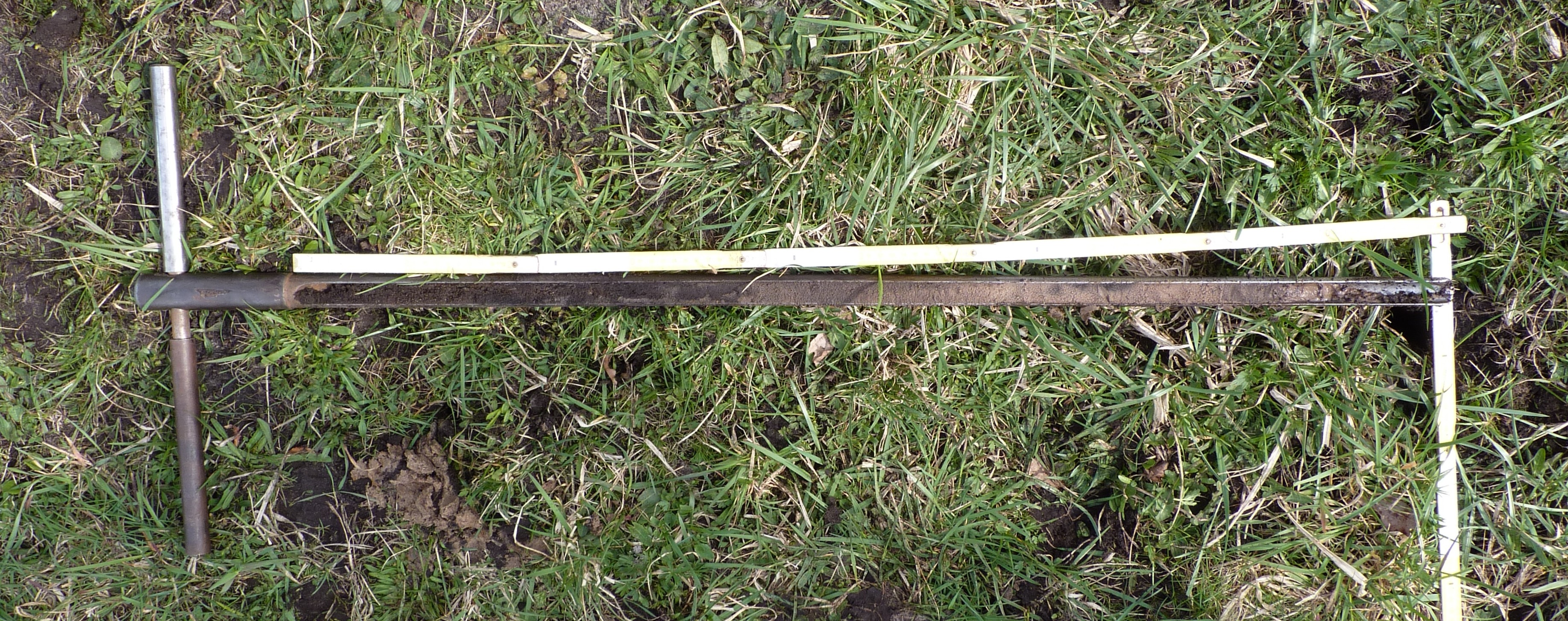 Pürckhauer mit Bodenprobe, entnommen in der Nuthe-Aue nahe Kolzenburg, Brandenburg